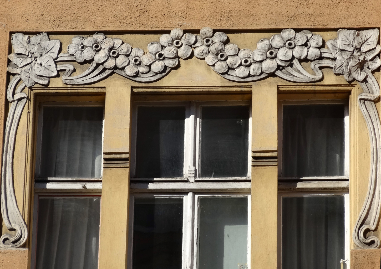 Kamienica przy ul. Cieszkowskiego 10 w Bydgoszczy (1902-1903, Rudolf Kern)